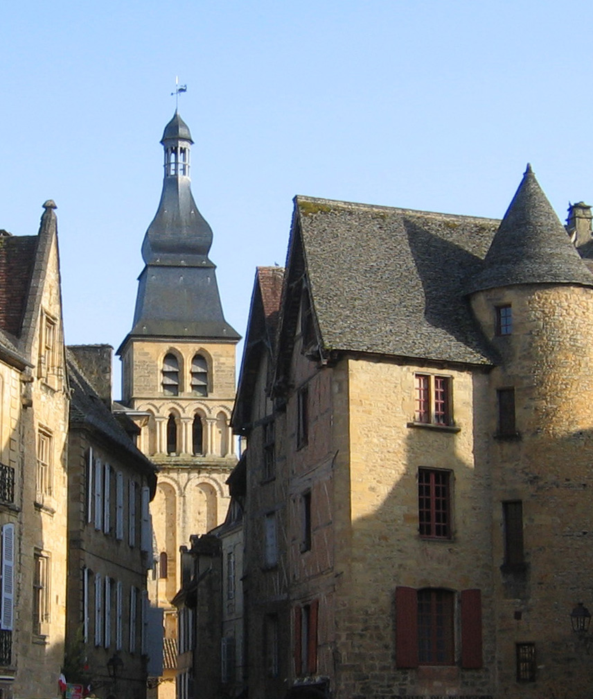 Cathédrale Saint-Sardos, Sarlat-la-Canéda, département de la Dordogne, région Aquitaine, France